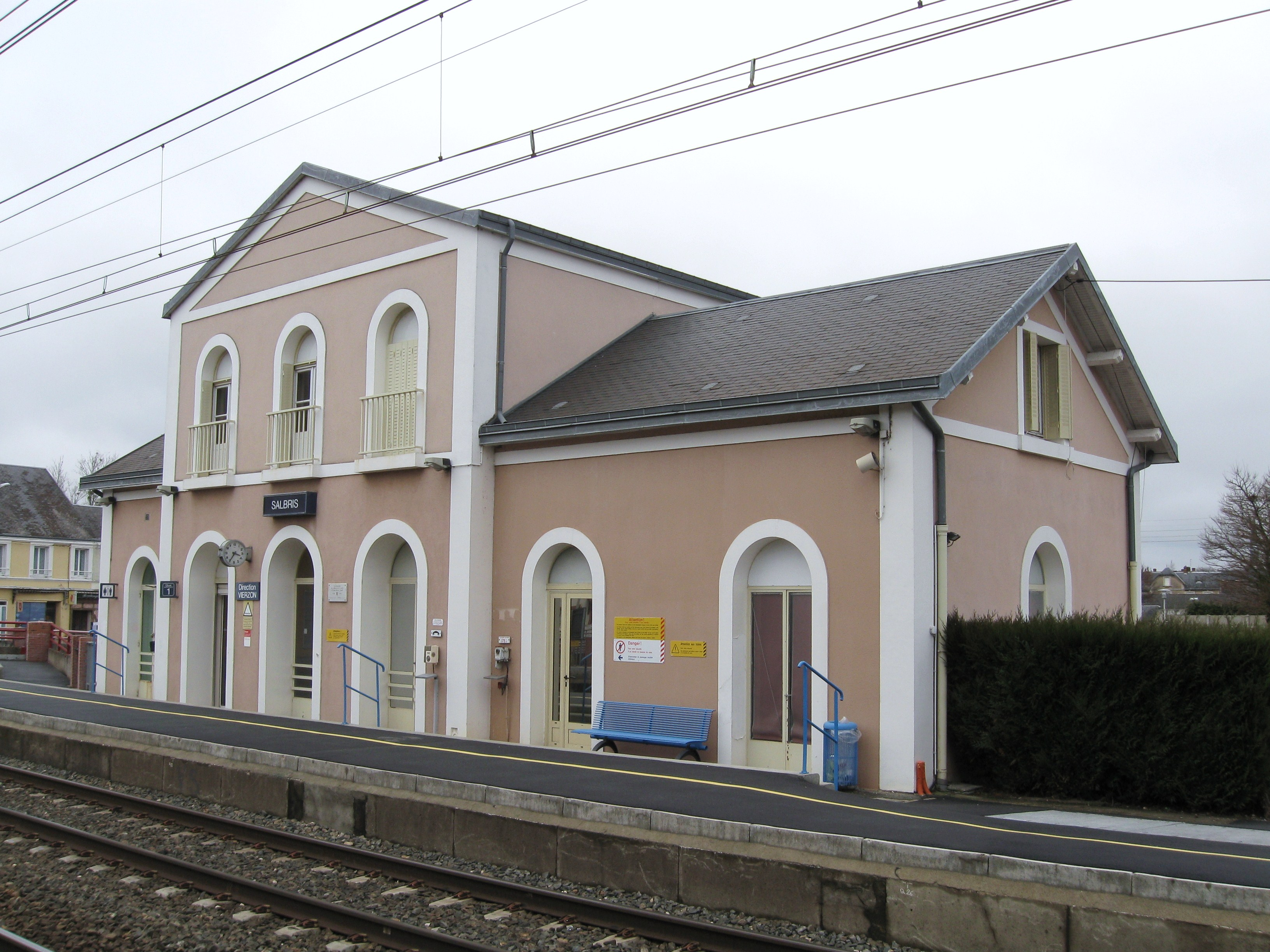 Gare de Salbris, Loir-et-Cher, France